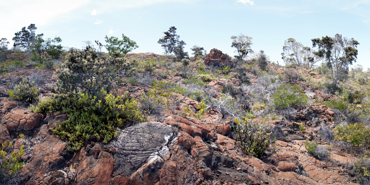 Иллюстрация Второва И.П. для учебника Гавайеведение.